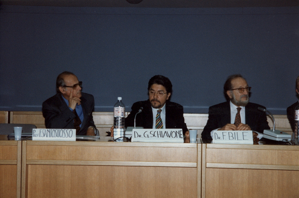 Congresso Melchiorre Gioia, Pisa 1994: A sn il prof. Fernando Santosuosso, a dx il dr. Franco Bile